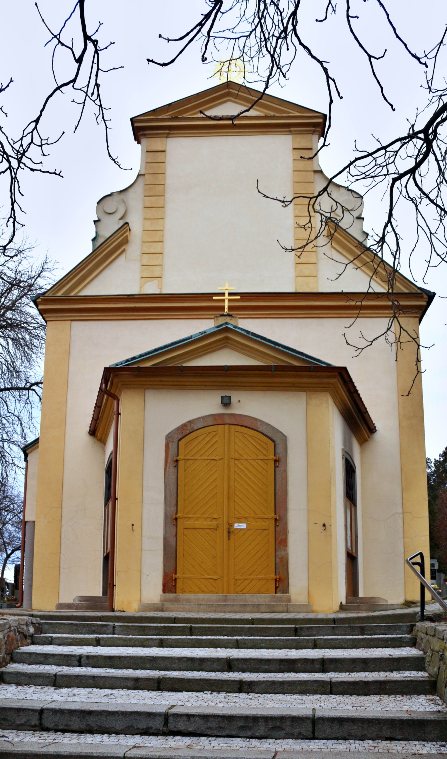 Kostel Narození Panny Marie v Modřanech